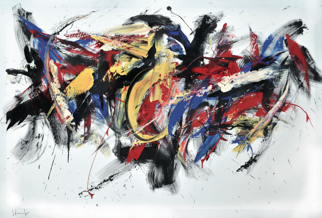 Tempi lineari, 100×150 cm, Tecnica mista su tela, 2013, opera di Silvio Formichetti